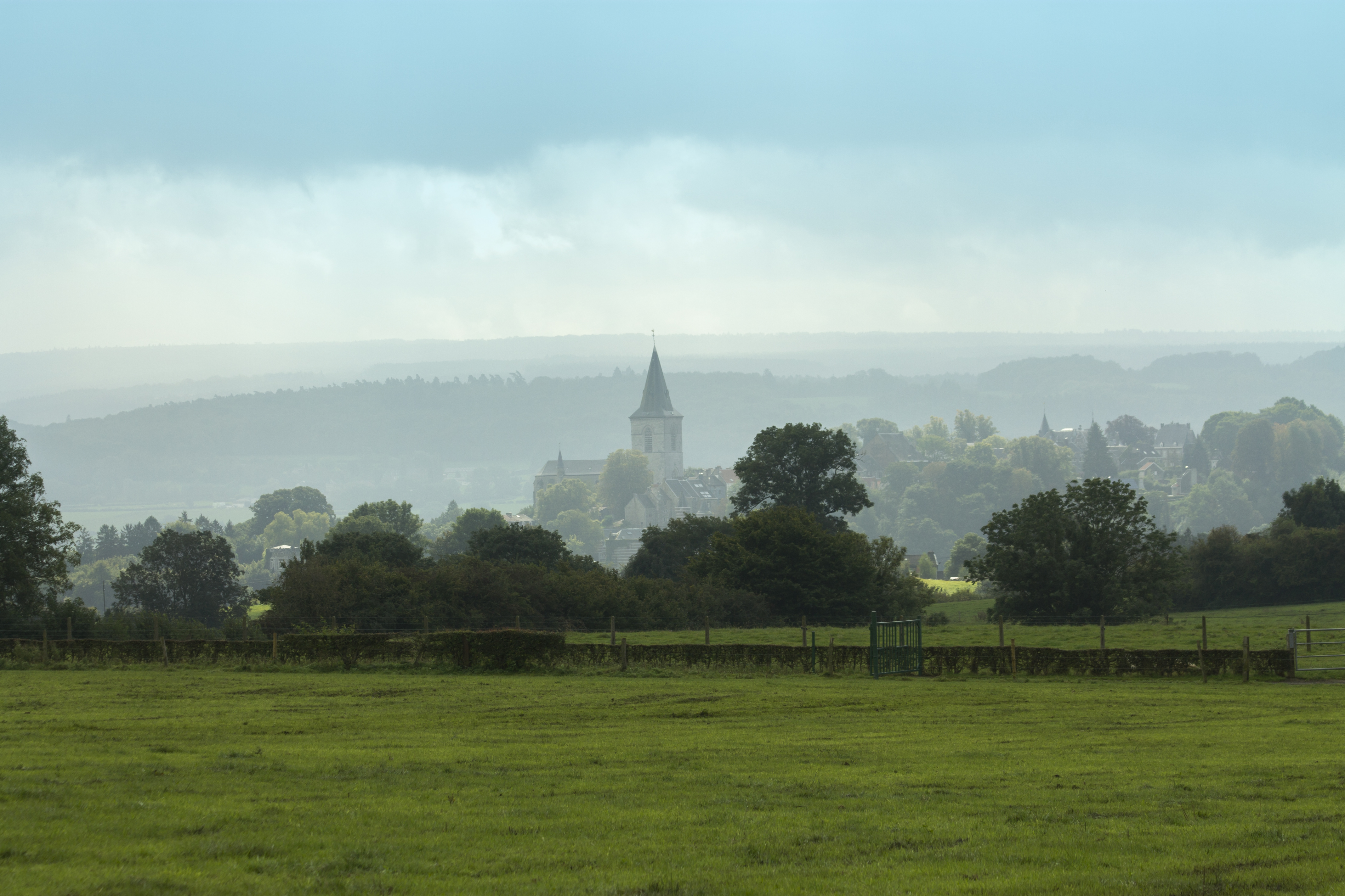 vue de Bilstain